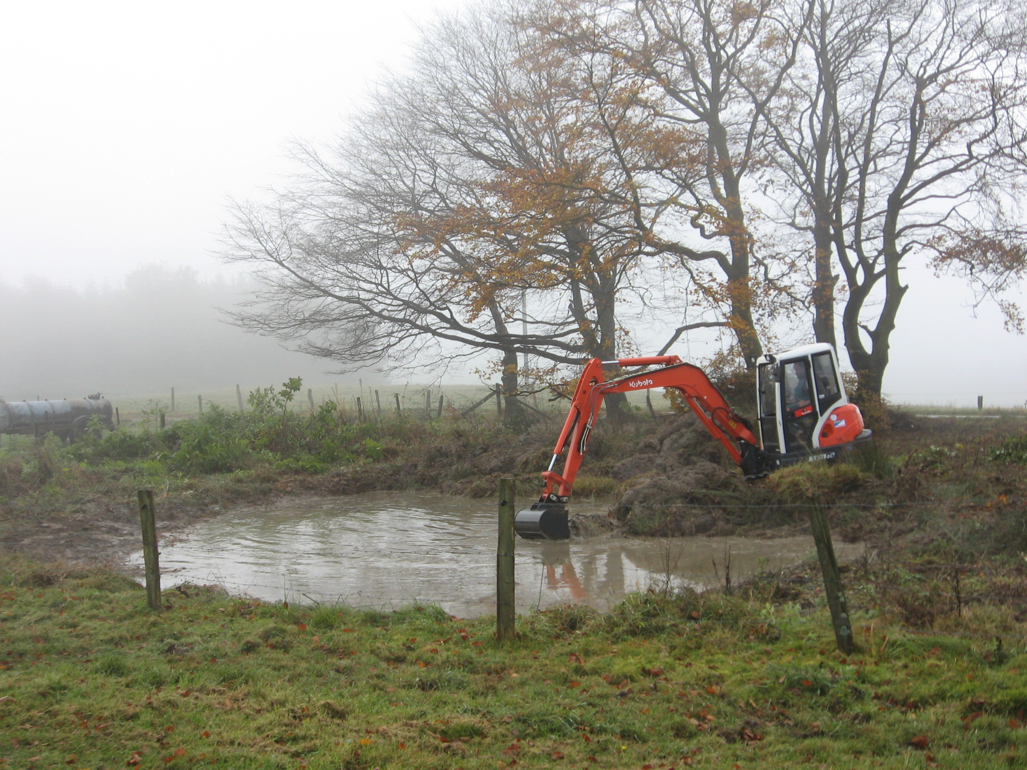 Bagger beim ausbaggern des verlandeten "Geschützter Landschaftsbestandteil Kleingewässer östlich Saal" bei Sundern-Saal im Sauerland (NRW) im Auftrage des Vereins für Natur- und Vogelschutz im Hochsauerlandkreis (VNV).